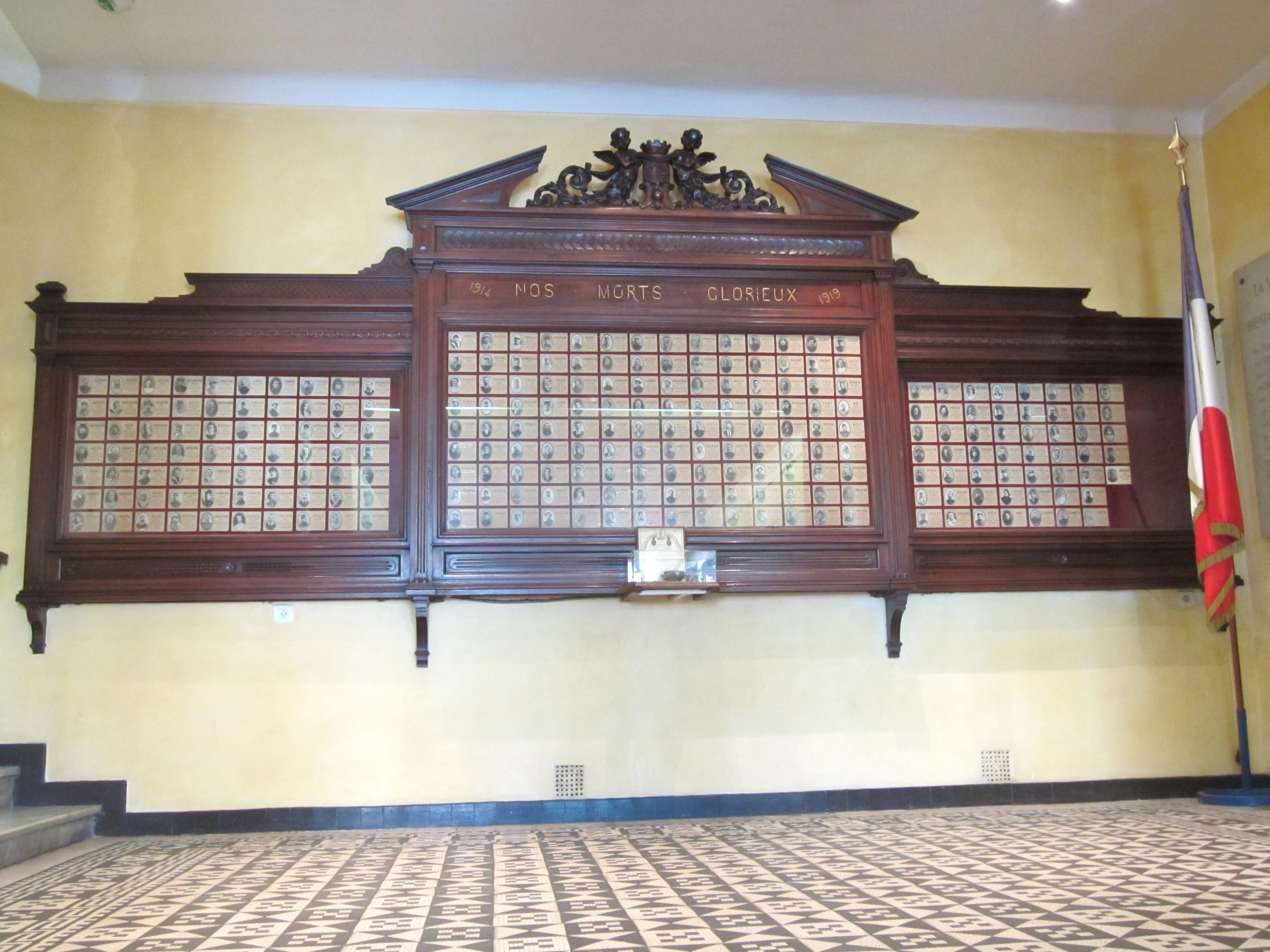 Description tableau commemoratif 14-19 Antibes tableau commemoratif 14-19 Antibes